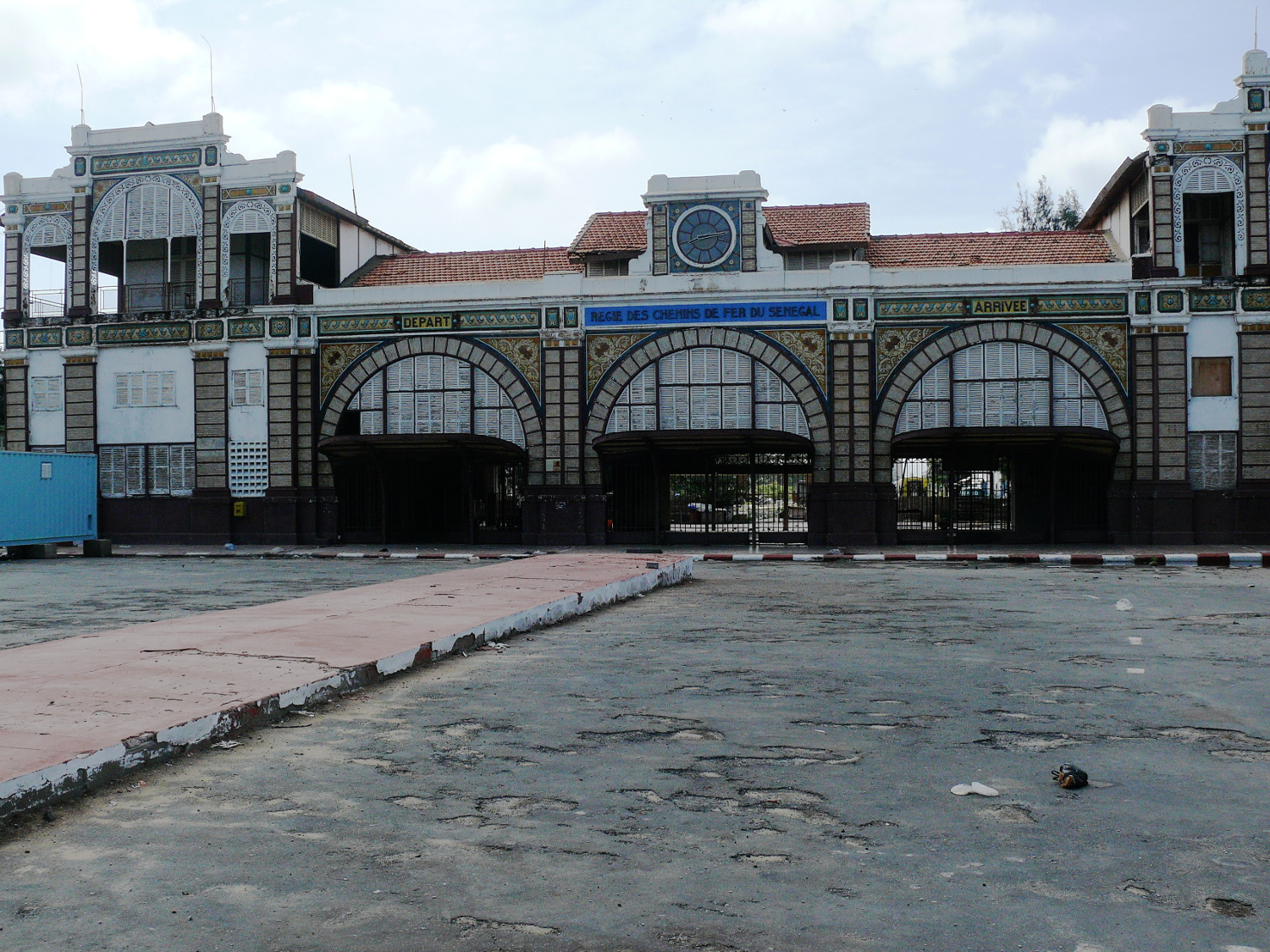 Parvis de la gare de Dakar à l'abandon, en juillet 2013